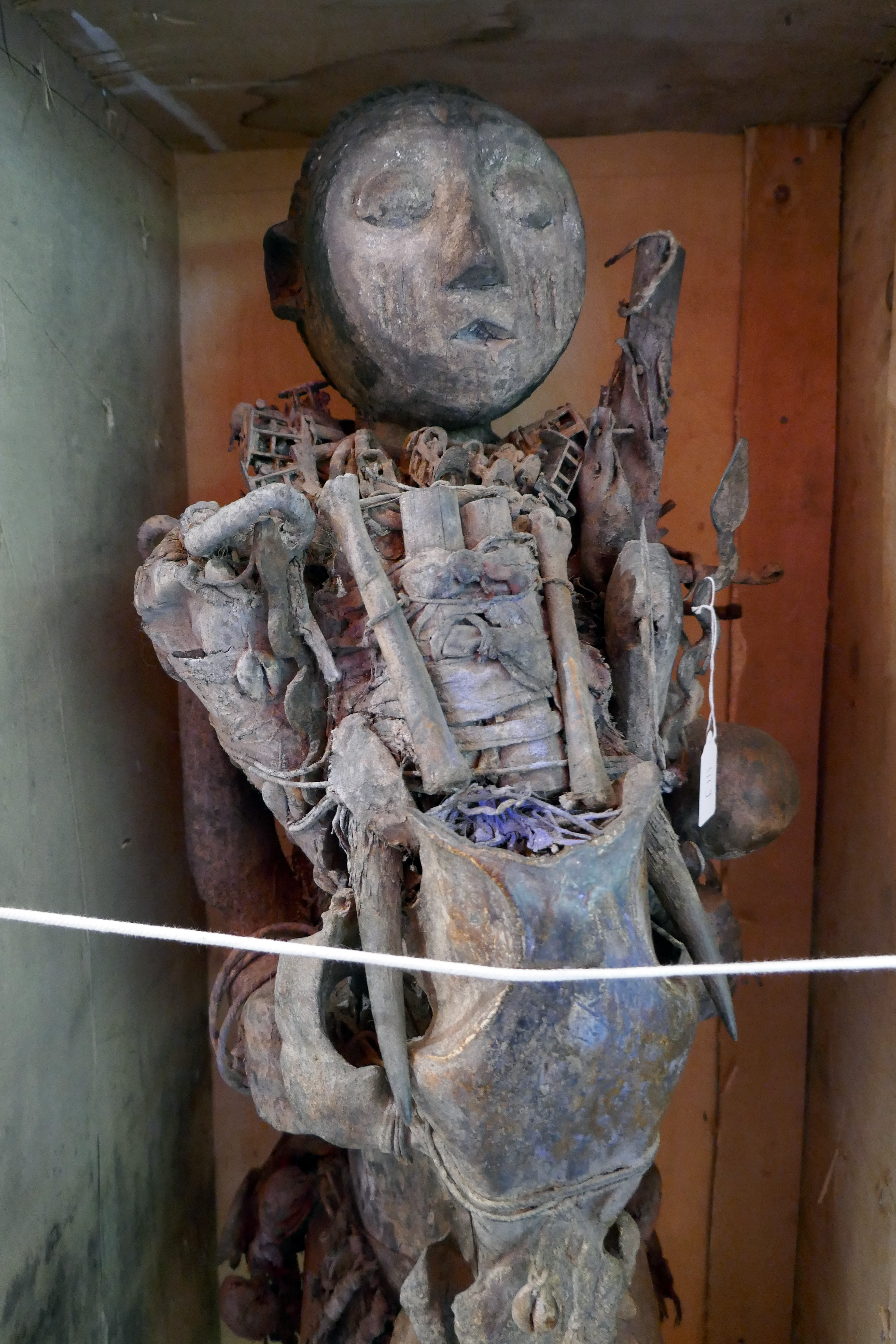 Fétiche Ewé. Autel du prêtre Aklan Djogbé. Glidji. Togo. 2007. Musée Vodou. Strasbourg.